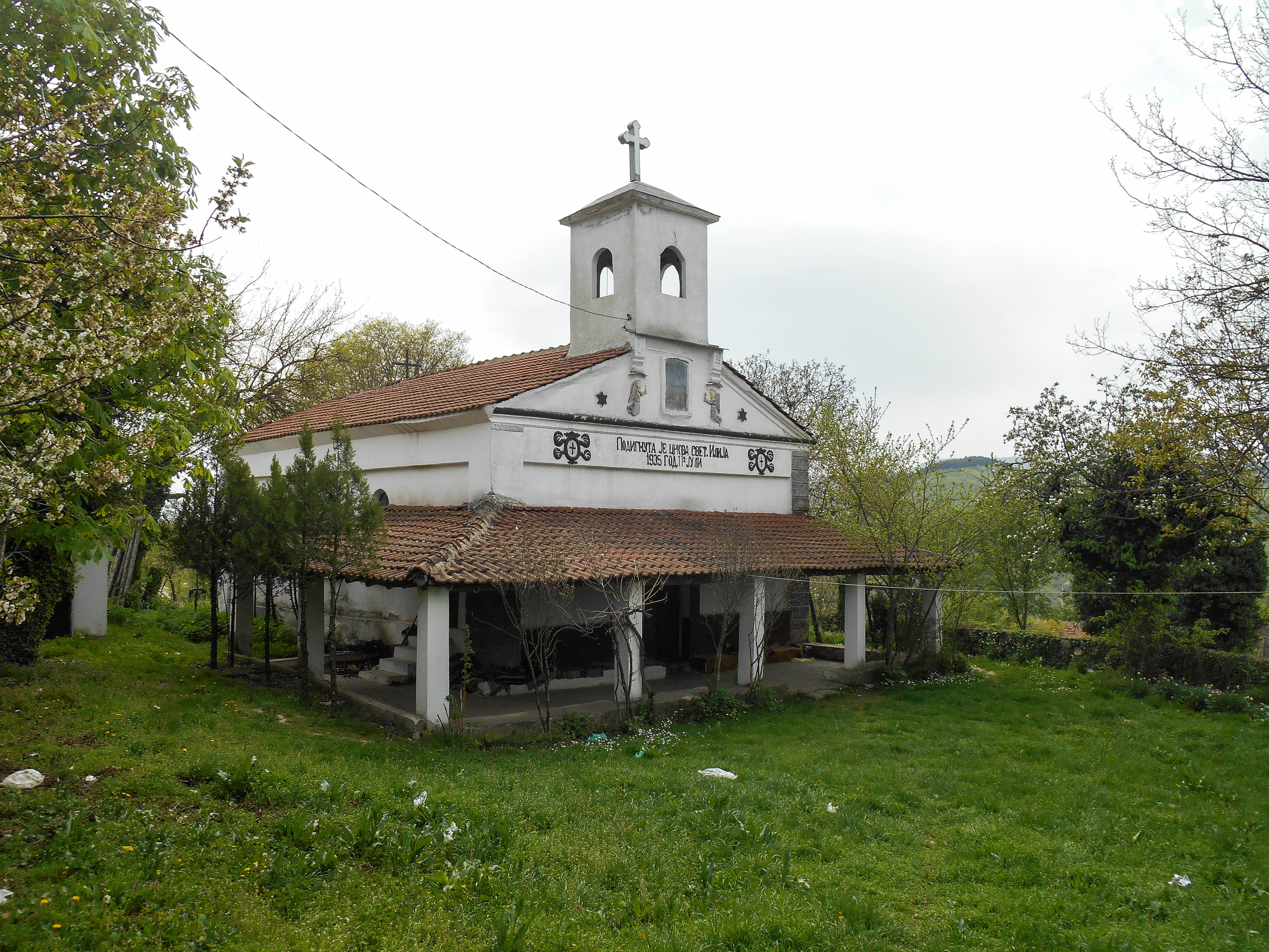 Црква Свети Илија